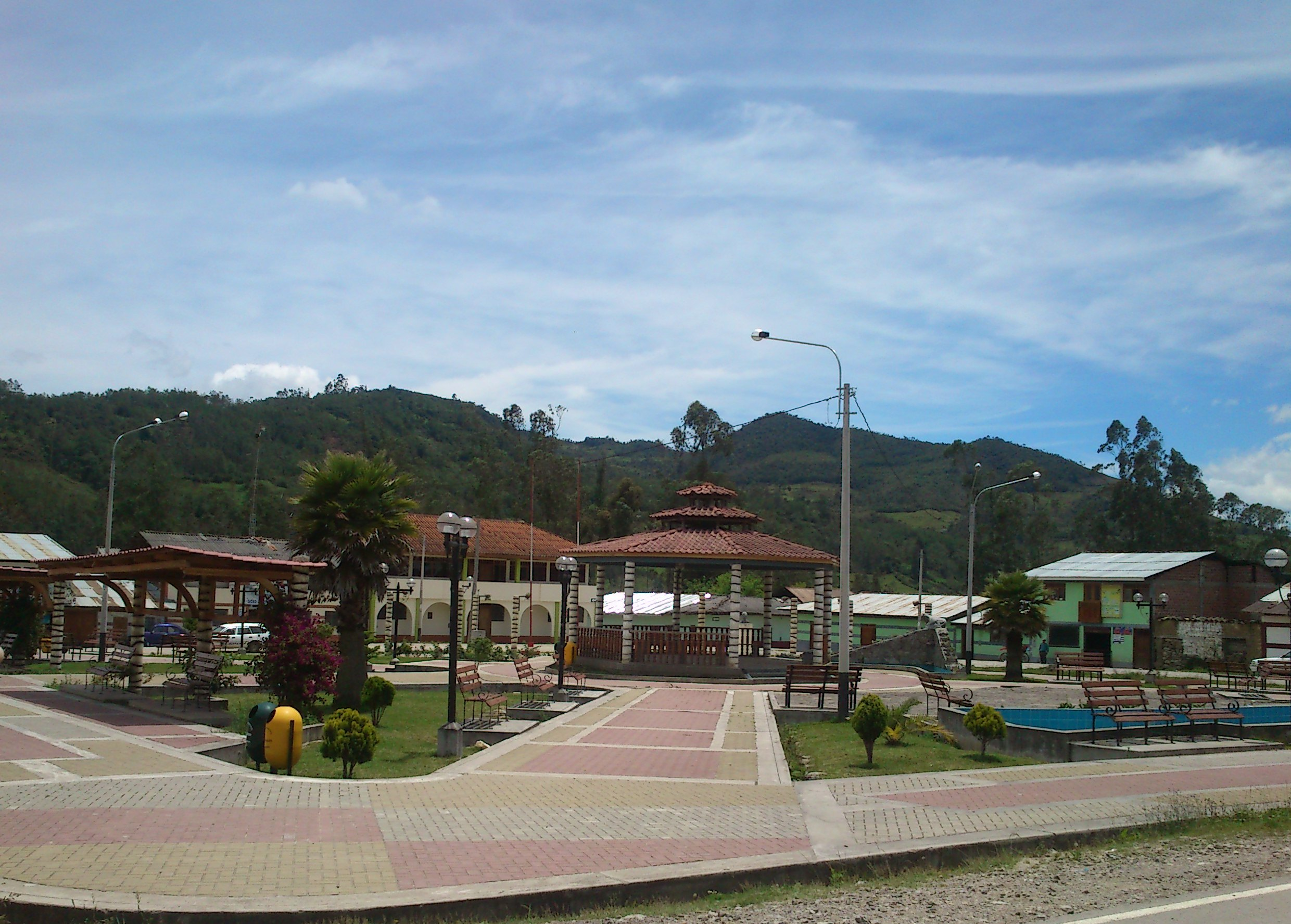 Plaza de Armas del Distrito de Molinopampa.